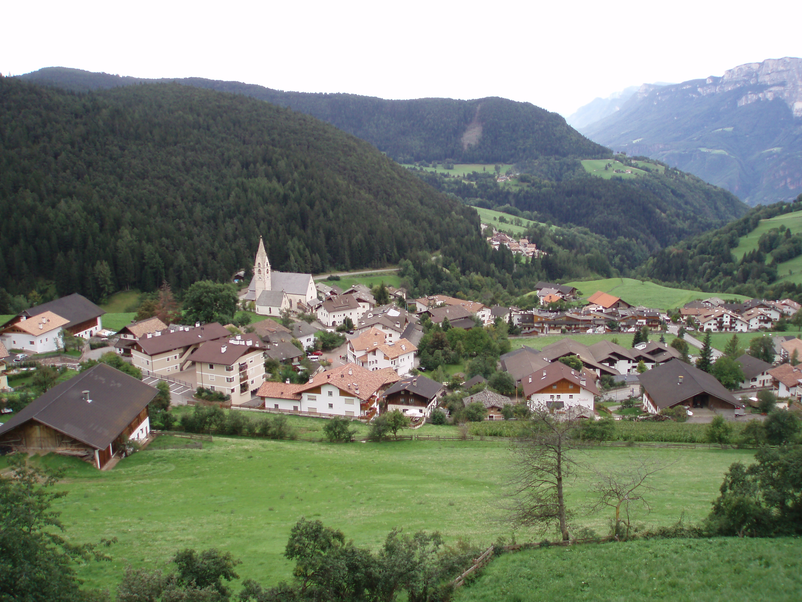 Mölten in Südtirol